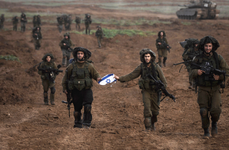 חיילי צה"ל יוצאים מרצועת עזה בתום מבצע "עופרת יצוקה".